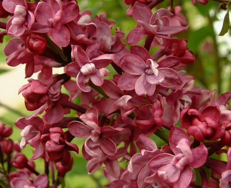 lilas Syringa vulgaris Gy mai 2004